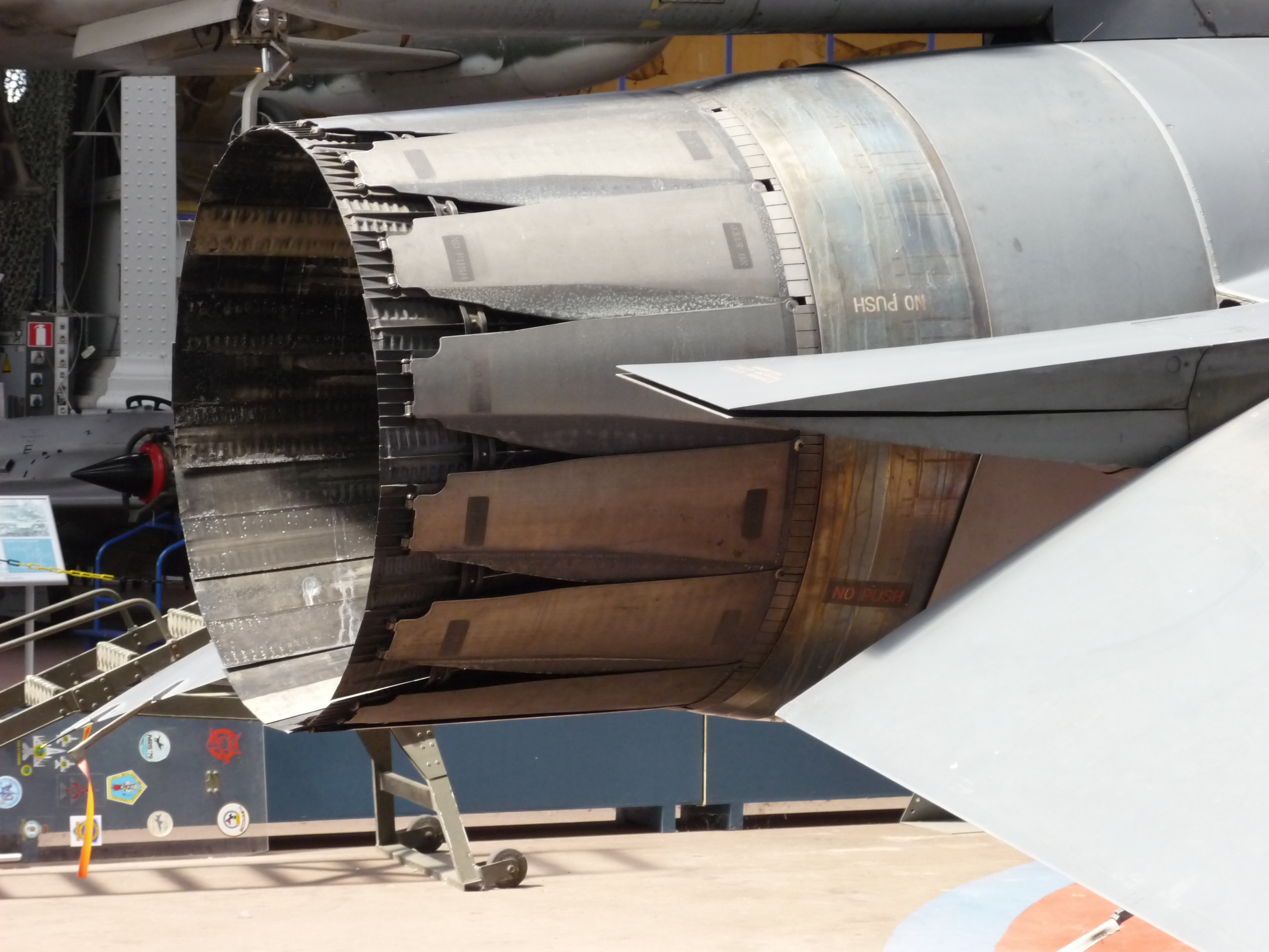 Tuyère réglable d'un F-16 Falcon. Royal Museums of Art and History Native nameMusées royaux d’art et d’histoireLocationBrusselsCoordinates50° 50′ 25.85″ N, 4° 23′ 35.37″ E Established1835Website